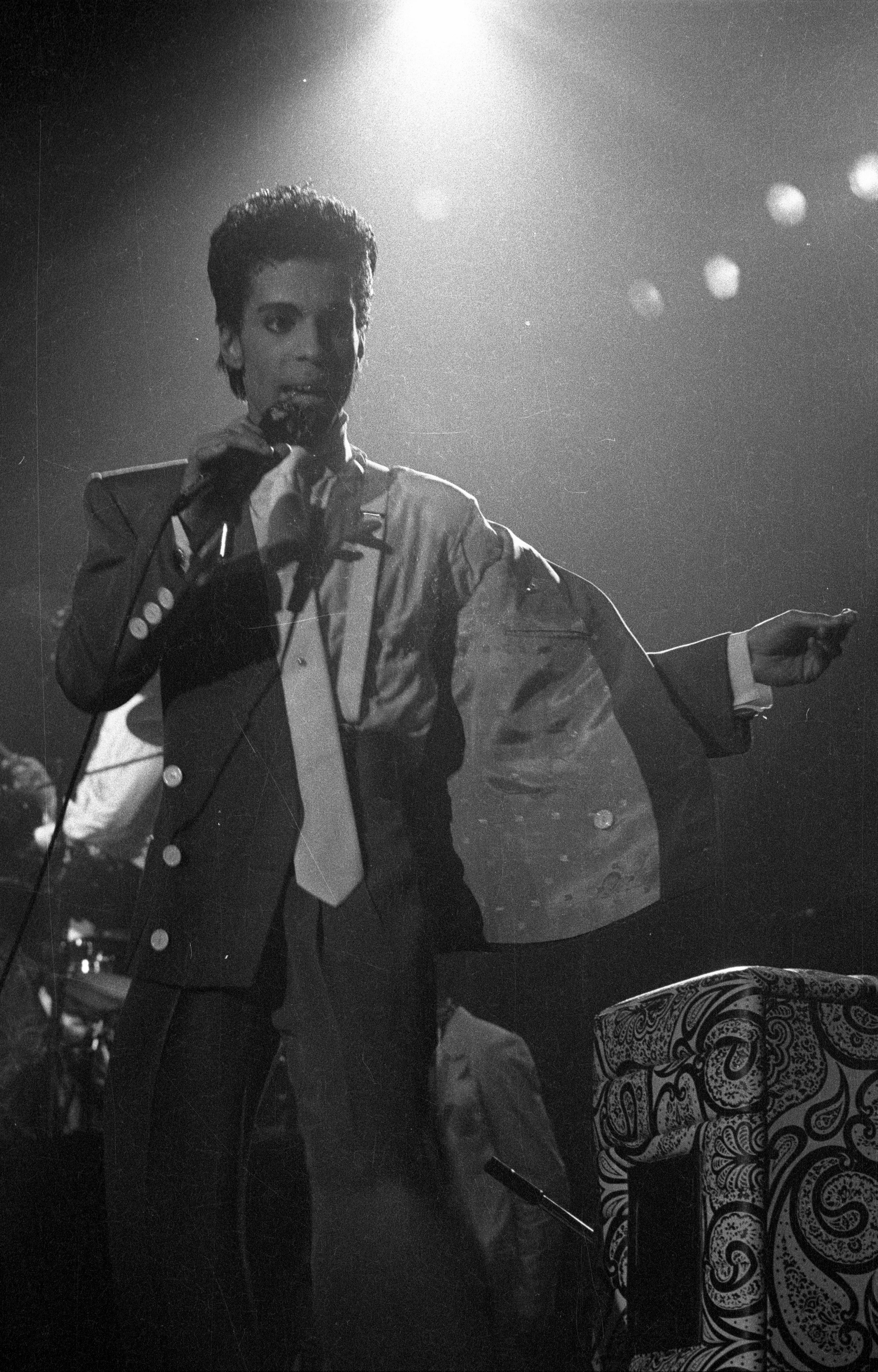 Forest National - Brussels - Belgium - 1986